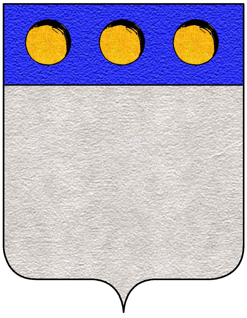 Stemma della famiglia Ridolfi di Borgo